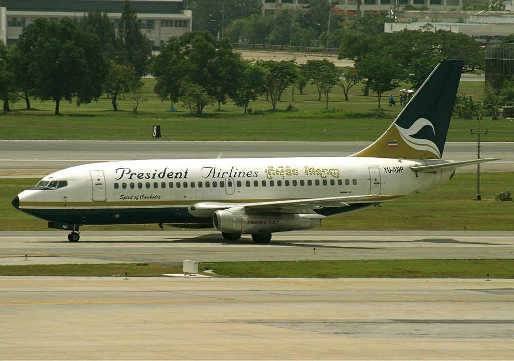 President Airlines Boeing 737-200